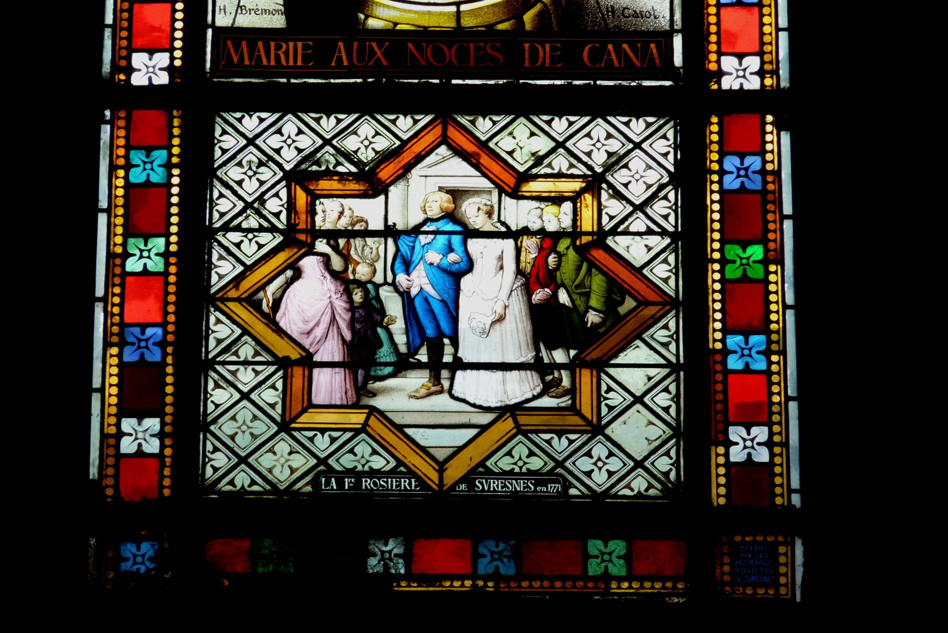 Bleiglasfenster (Ausschnitt) in der katholischen Pfarrkirche Cœur-Immaculé-de-Marie in Suresnes, Darstellung: ?